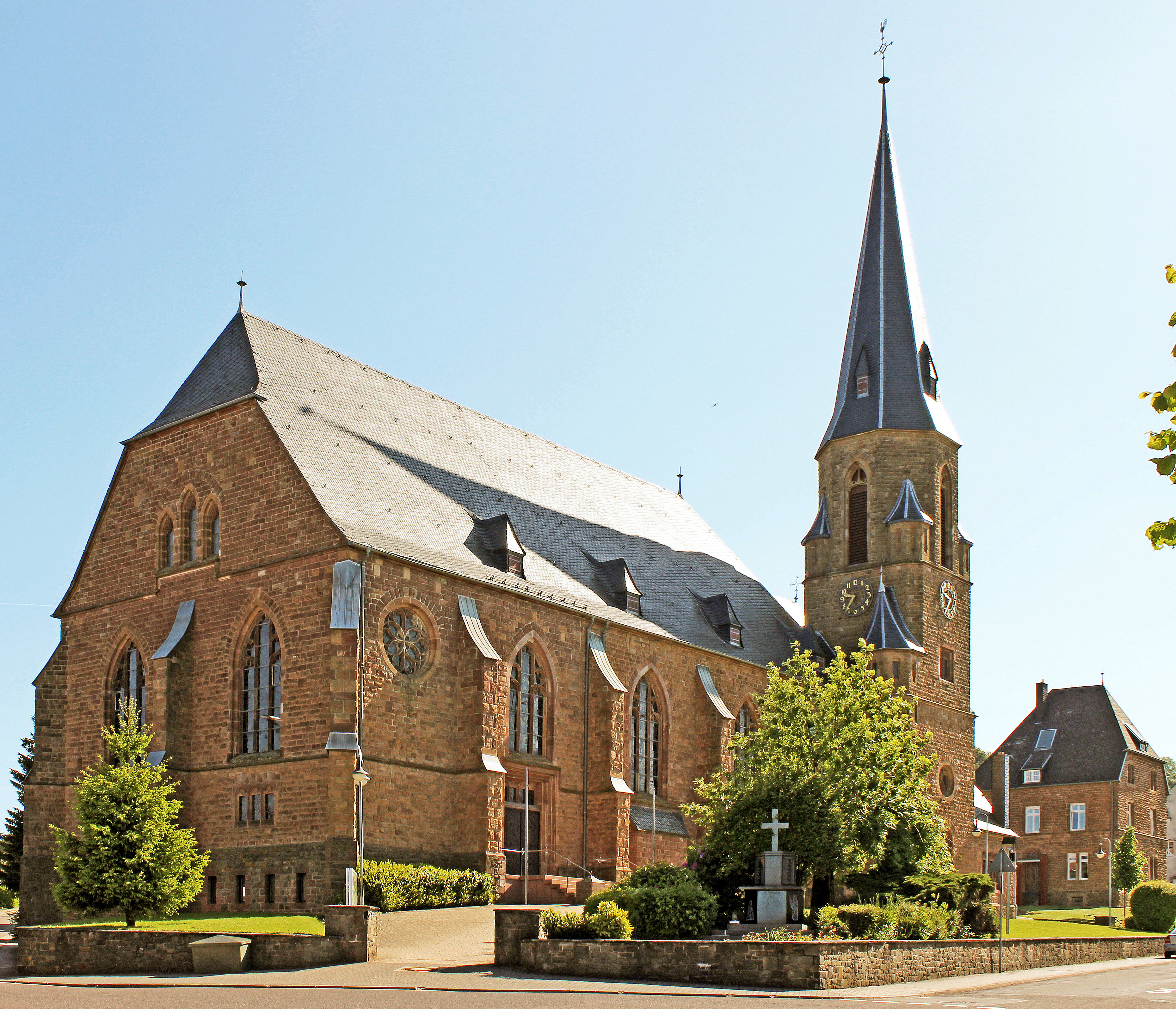 Die katholische Pfarrkirche Herz Jesu in Gresaubach, einem Stadtteil von Lebach, Landkreis Saarlouis, Saarland